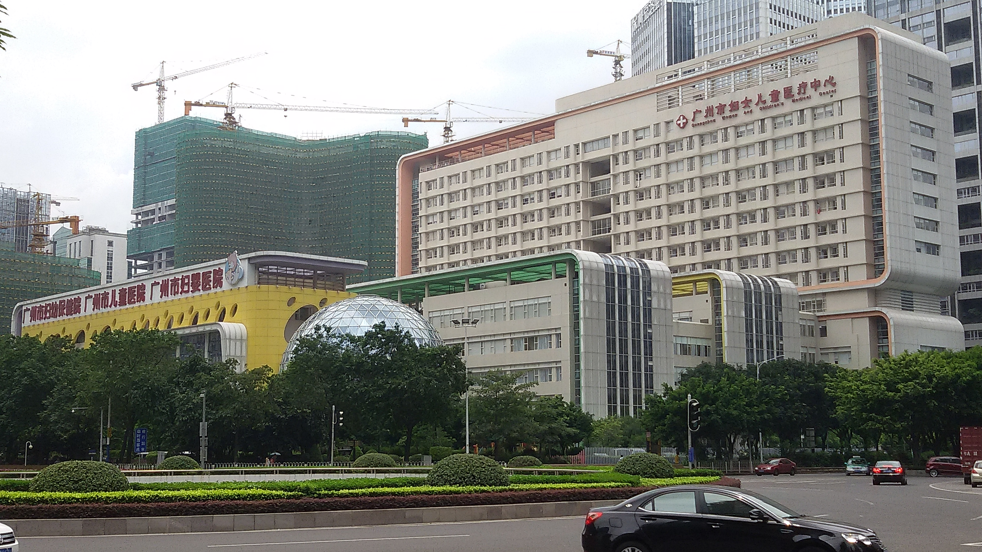 粵語: 廣州市婦女兒童醫療中心